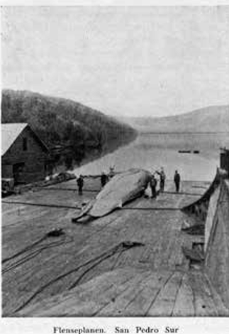 Una fotografía de la estación ballenera en plena faena.